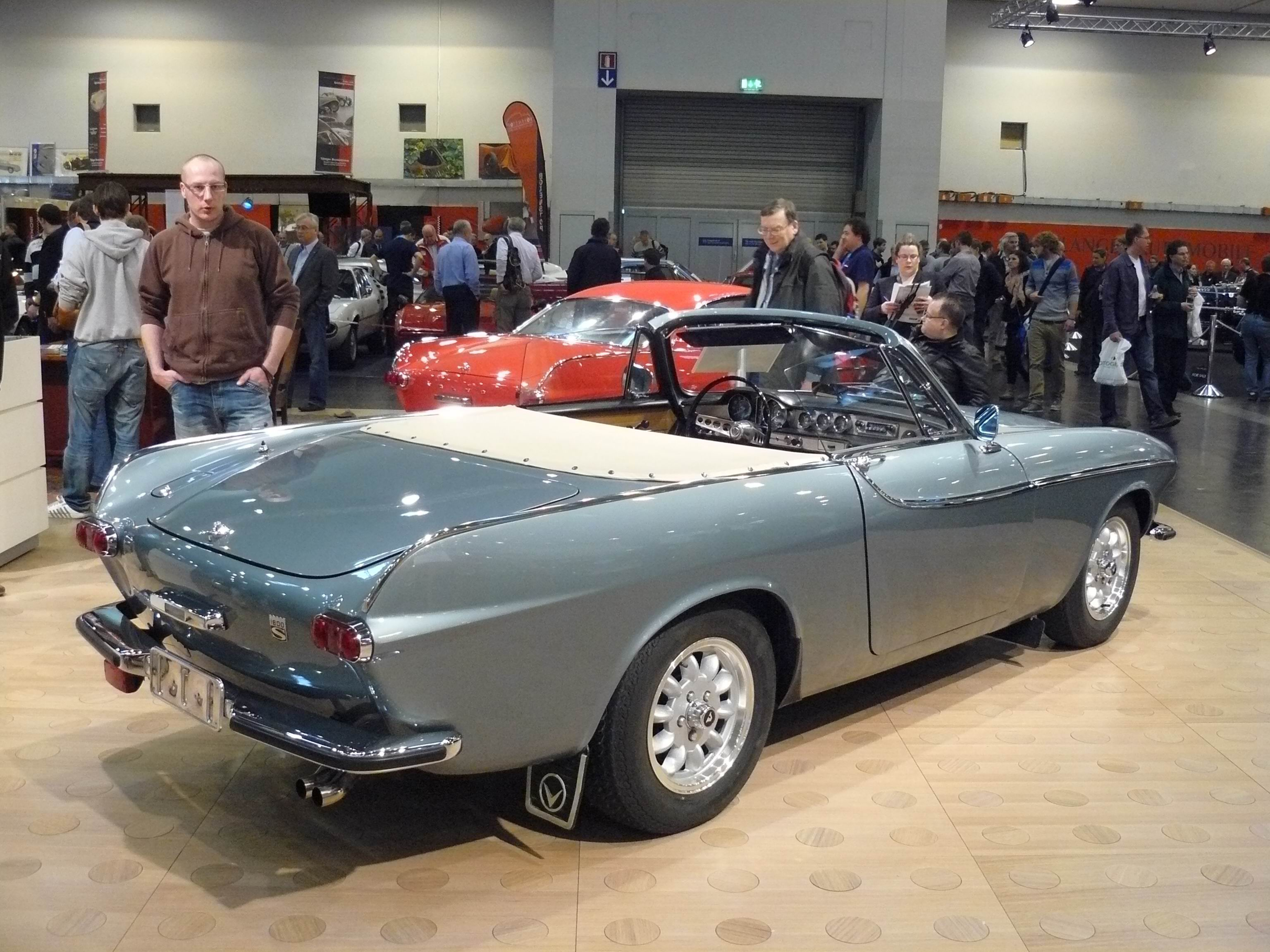 Essen 2011